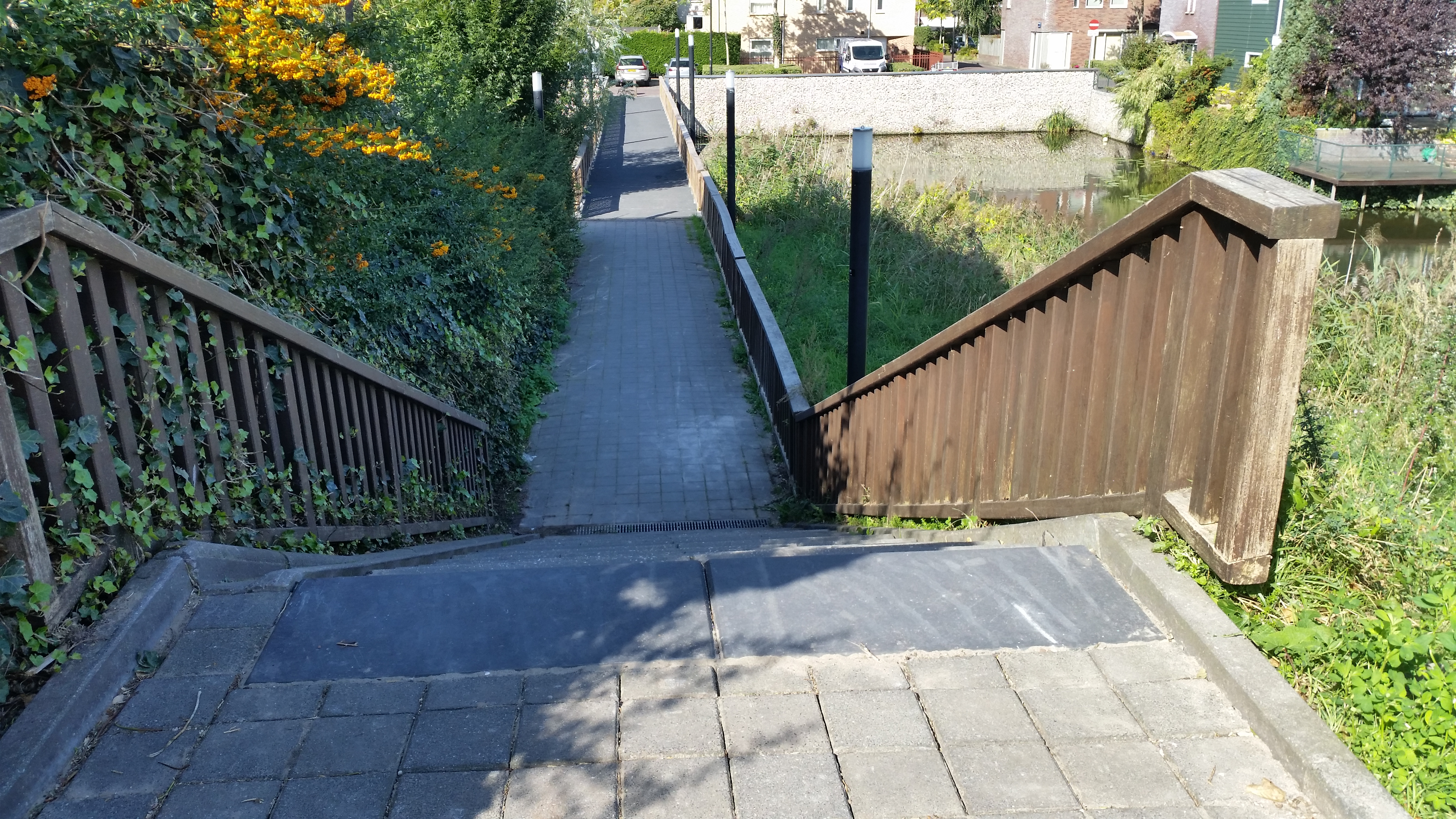 Overzicht over Brug 2140 (in Amsterdam)